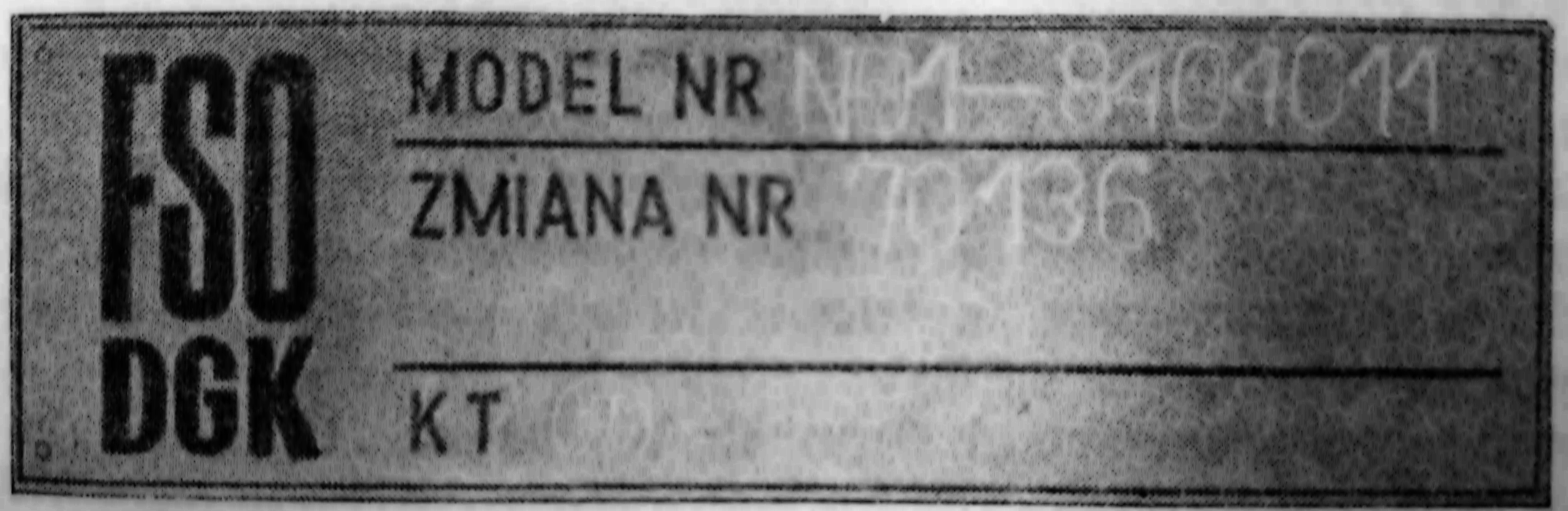 Przykład tabliczki znamionowej modelu wzorcowego według schematu stosowanego w Dziale Głównego Konstruktora FSO